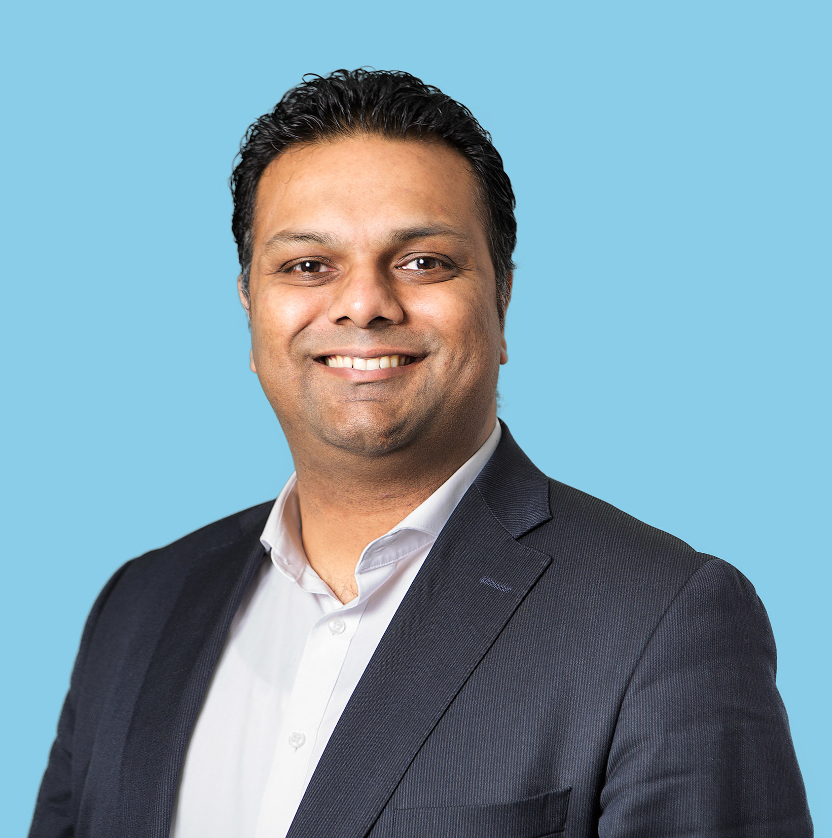 Kandidaat-Kamerlid. Foto: Lex Draijer.